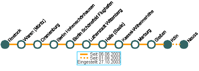 Author: BR 146 (Armin Emde) Describtion: Plan of the trainservice Interconnex 3 Neuss - Rostock - Selfdrawn Autor: BR 146 (Armin Emde) Beschreibung: Netzplan der Zugverbindung Interconnex Neuss - Rostock - Selbstgezeichnet